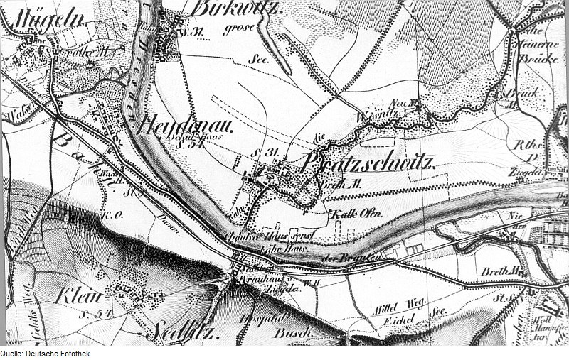 Original image description from the Deutsche Fotothek Pirna-Pratzschwitz. Oberreit, Sect. Dresden, 1821/22